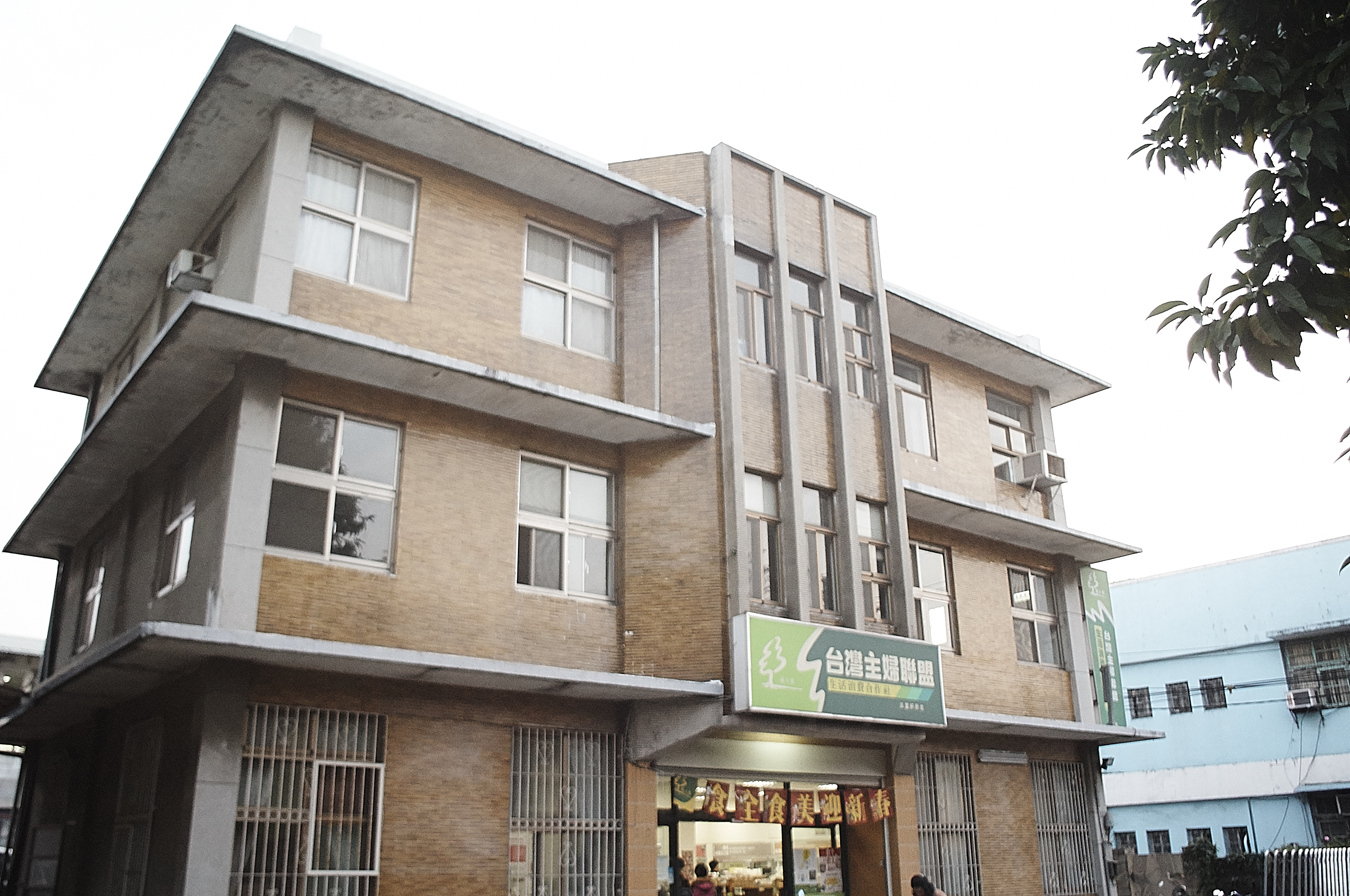 台灣主婦聯盟生活消費合作社三重好所在，地址：新北市三重區重新路五段408巷18號。